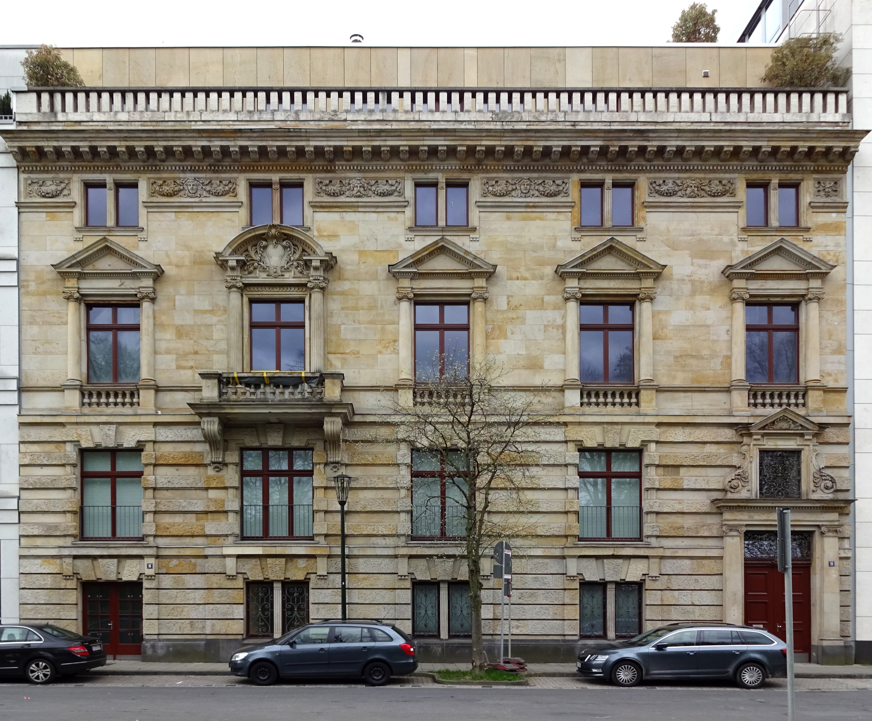 Haus Goltsteinstraße 15–16, Düsseldorf-Stadtmitte